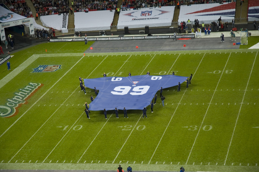 Giants' uniform i stor skala på Wembley.